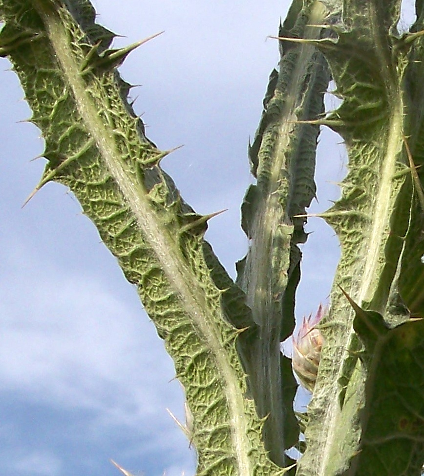 Onopordum nervosum - (Cardo gigante) - Detalle de los tallos alado-espinosos con su red de nervios reticulados. - Circa Estación de Contenedores de RENFE-ADIF de Abroñigal/Embajadores, Madrid (España).